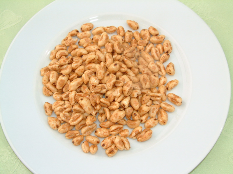 Description: gepuffter Weizen, puffed wheat (sorry, unter falscher Bezeichnung gespeichert) Photographer: Benutzer:BMK 2003-08-25 Quellenangabe und Beleg an BMK(at)clever.ms erbeten.